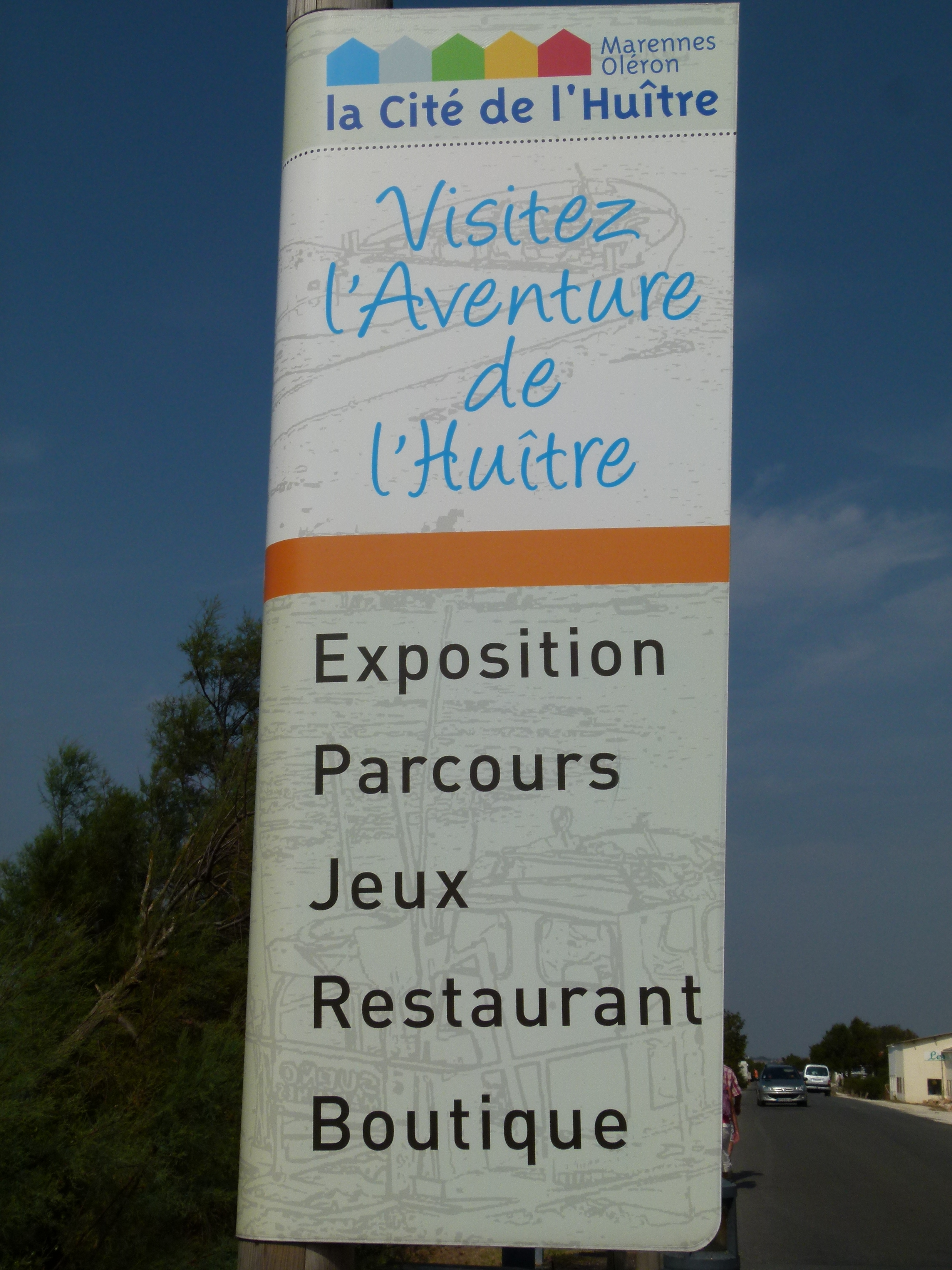 Panneau de la Cité de l'Huître à Marennes (Charente-Maritime).